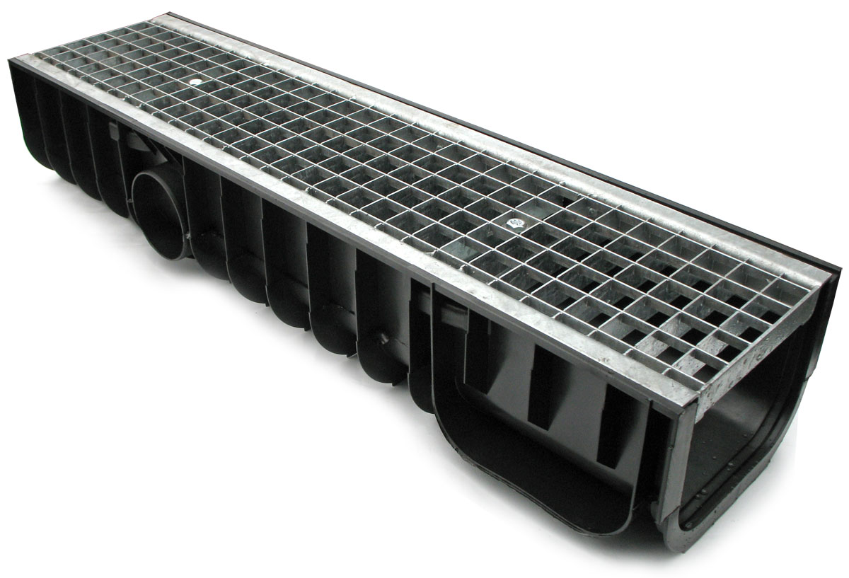 Пластиковый канал поверхностного водоотвода.